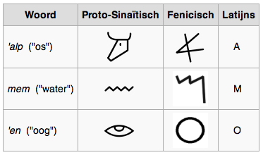 proto-sinaitisch, fenicisch en latijns schrift, schrifttekens, alfabet - overzicht tabel